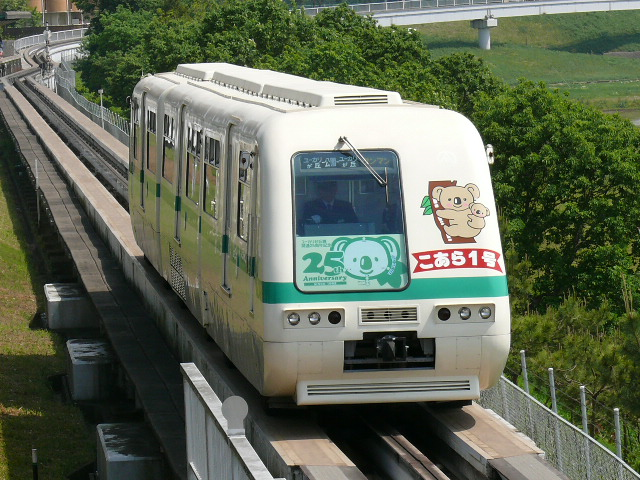 開業25周年のヘッドマークをつけて走行する第1編成 女子大～中学校間